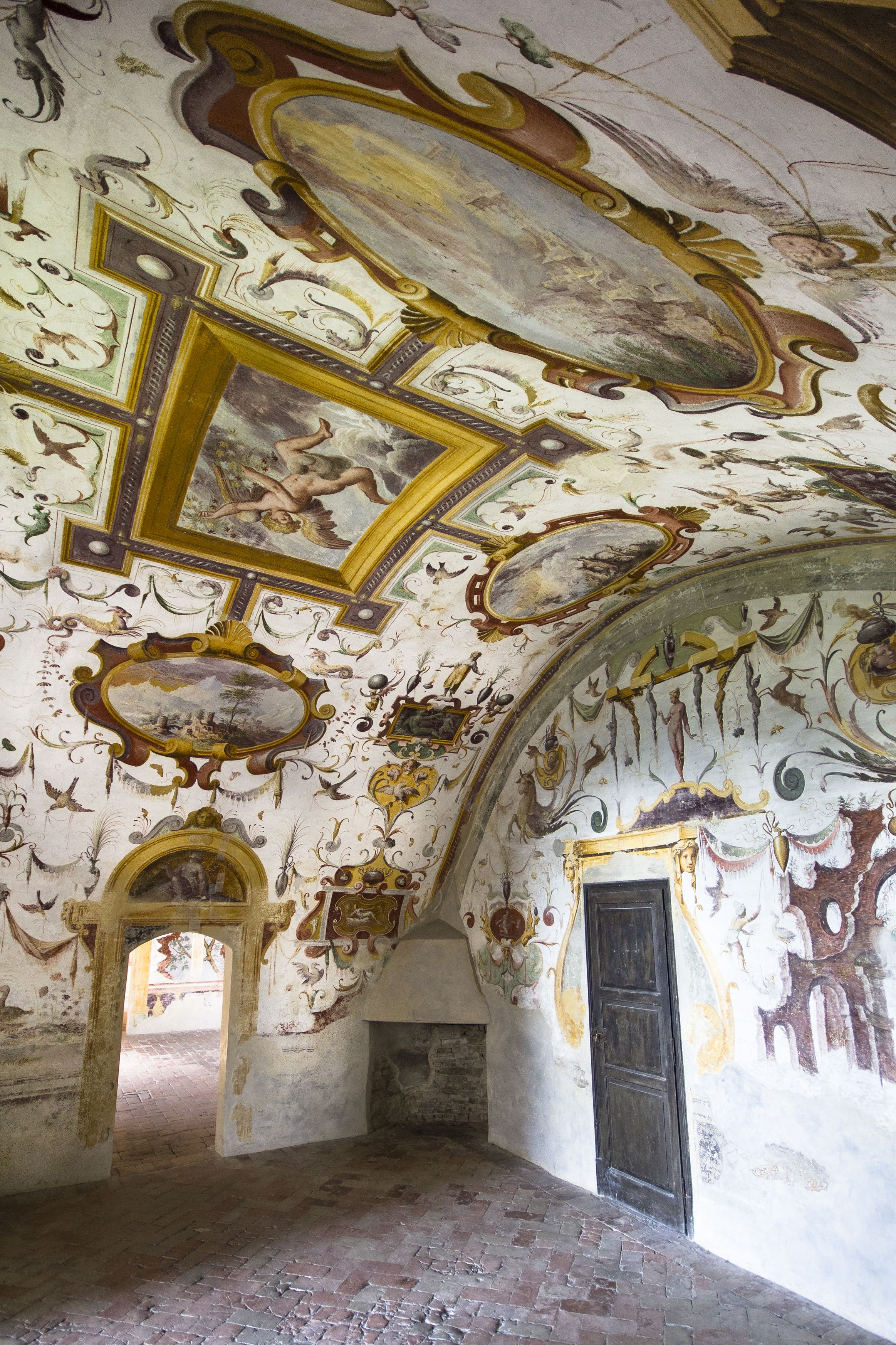 Castello di Torrechiara - MIBAC - Interno This is a photo of a monument which is part of cultural heritage of Italy.